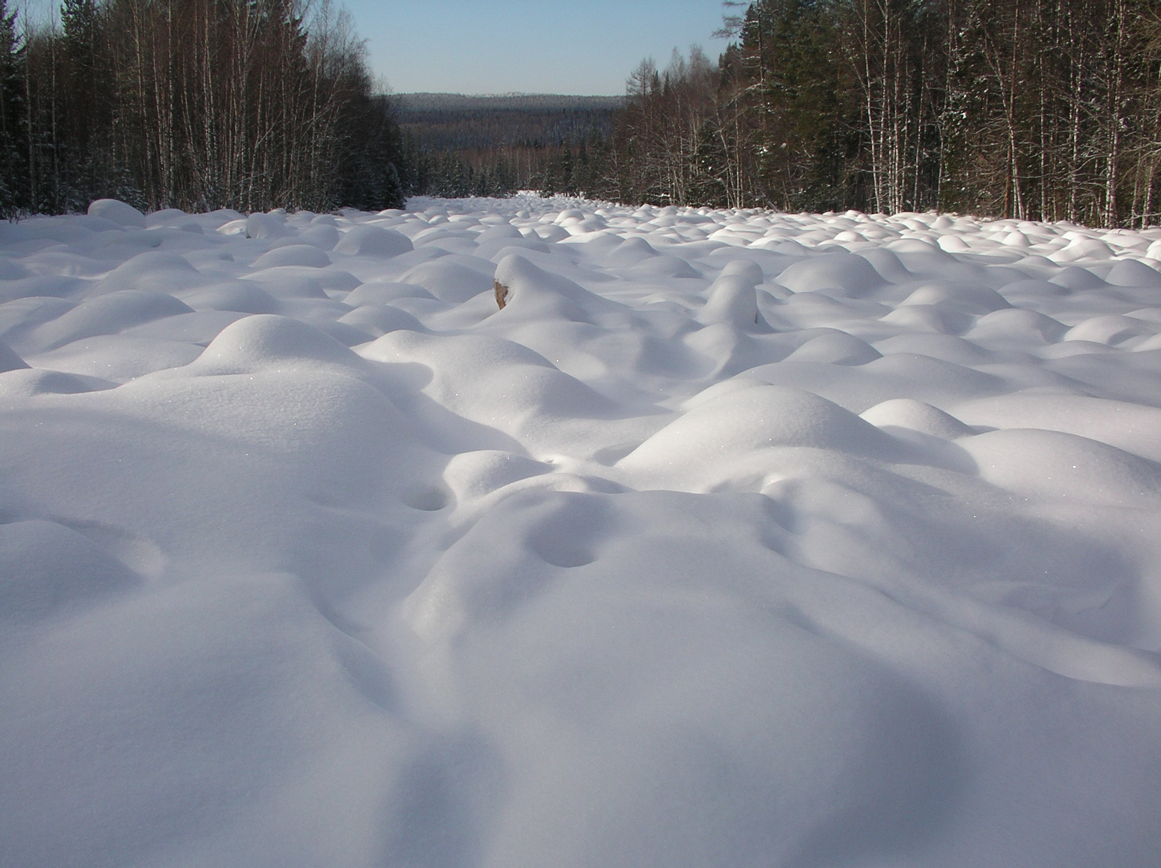 Большой каменной реки Таганая.